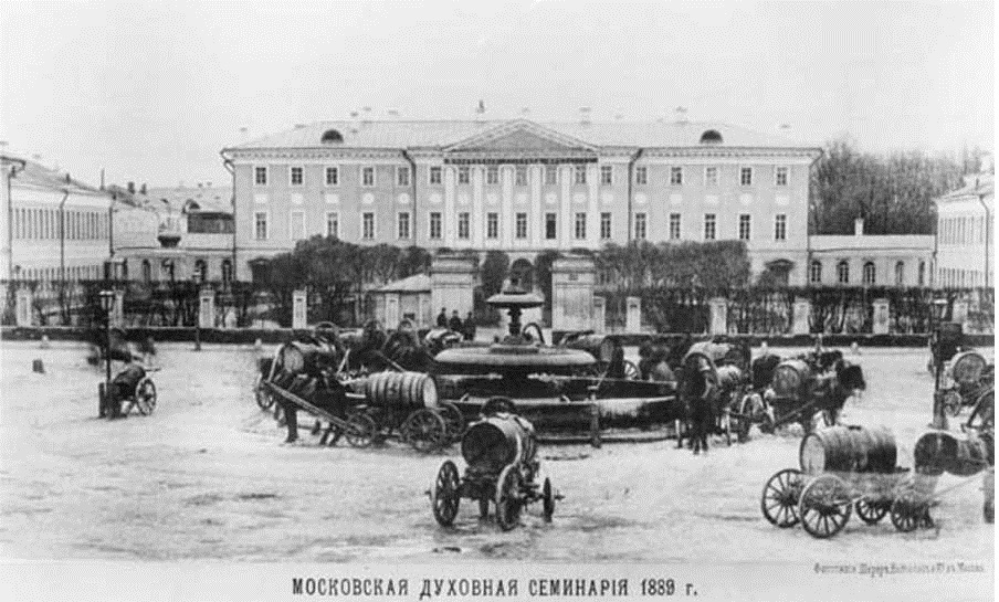 Московская духовная семинария. Начало XX века